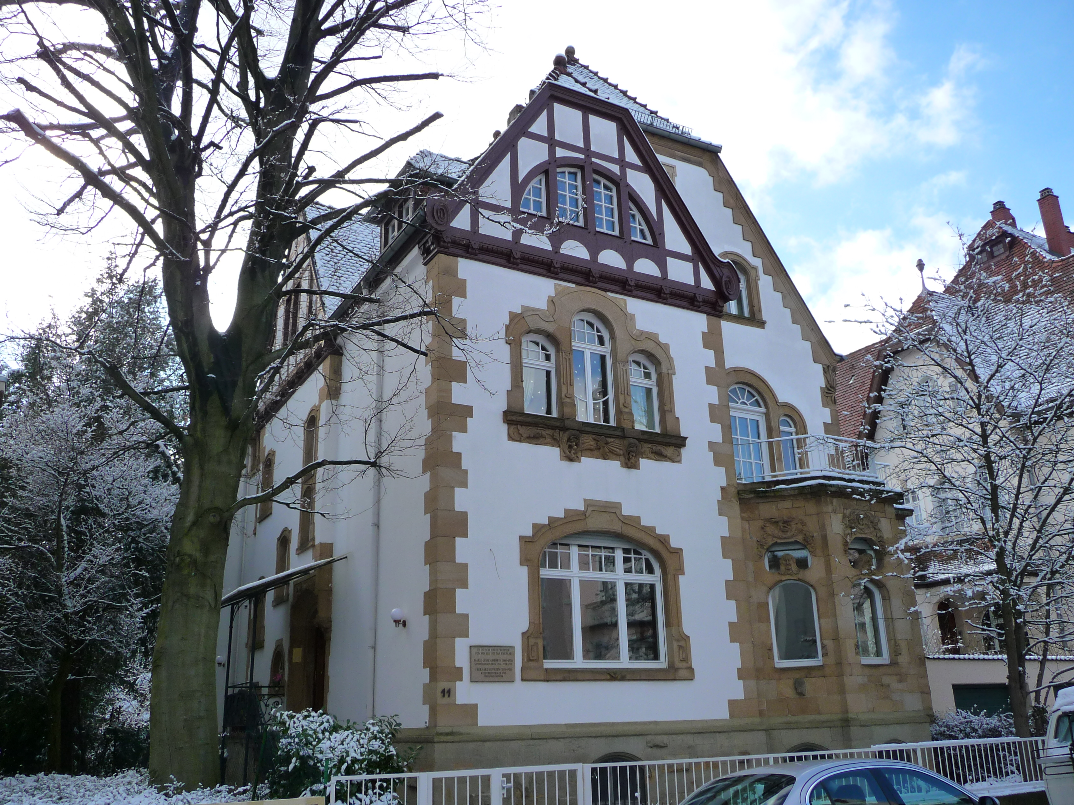 Wohnhaus in Heidelberg-Neuenheim; von 1904 bis 1923 wohnte hier das Ehepaar Marie Luise und Eberhard Gothein